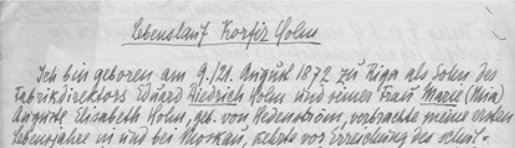 Schriftprobe von Korfiz Holm